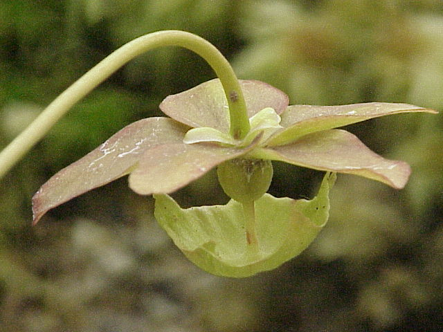 Species: Sarracenia psittacina Family: Sarraceniaceae Image No. 1